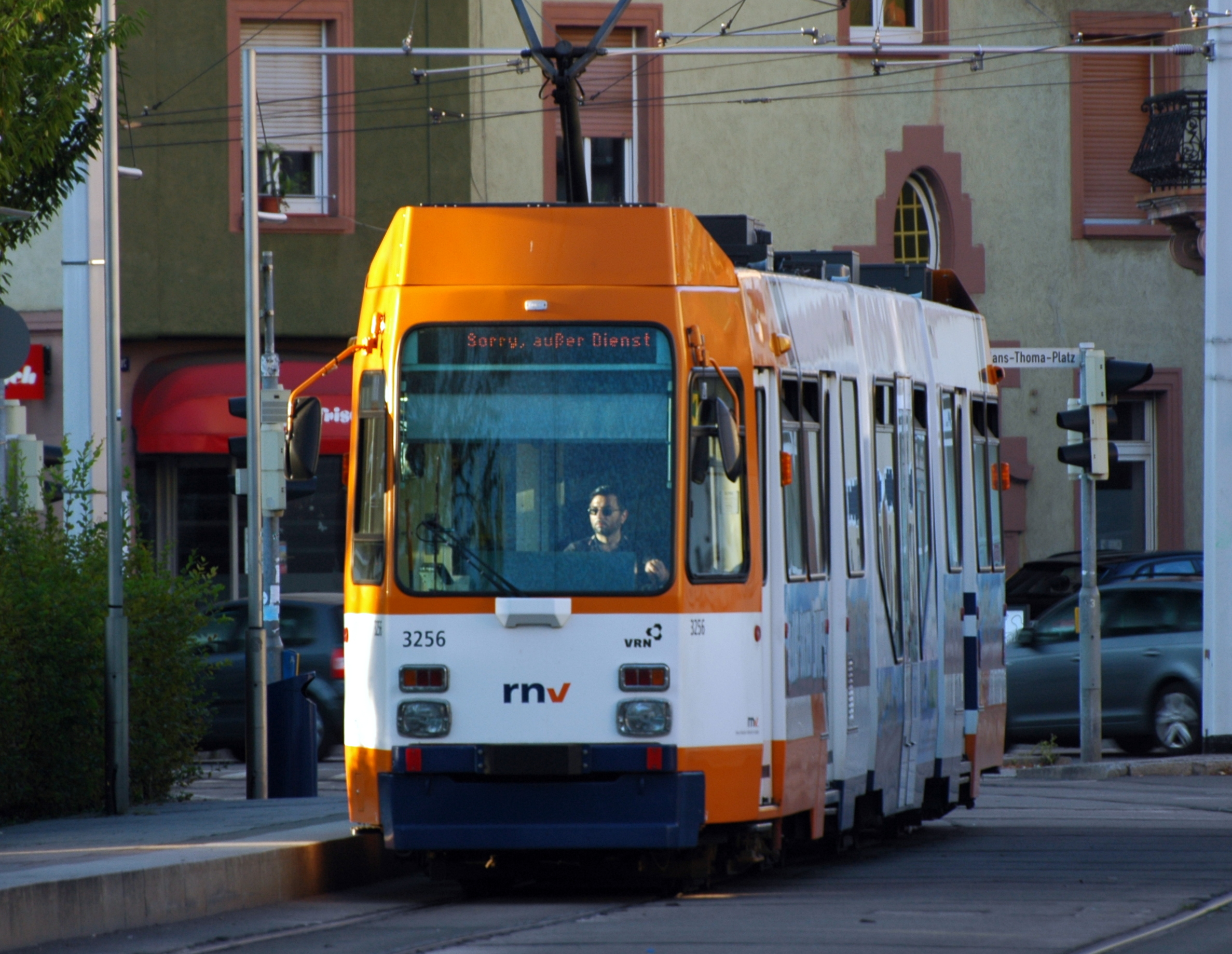 Heidelberg - Duewag M8C-NF - RNV 3256 - Sorry, außer Dienst